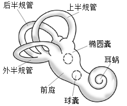 平衡障碍图像，取自公有领域